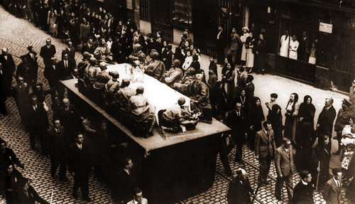 Paso de la Santa Cena, Procesión Santo Entierro, Viernes Santo de Zaragoza, años treinta